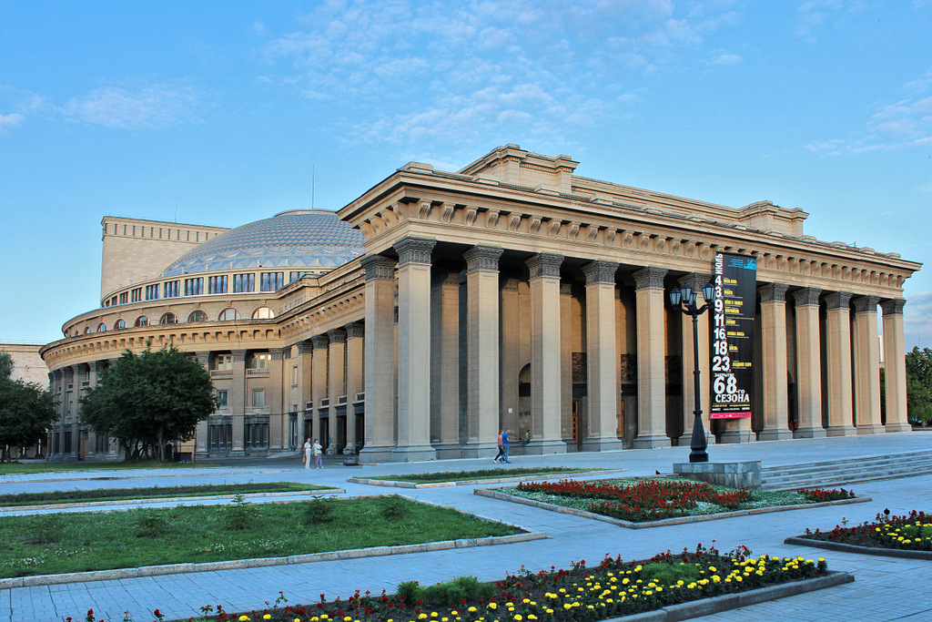 Здание Новосибирского театра оперы и балета (Новосибирская область, Новосибирск, Красный проспект, 36)